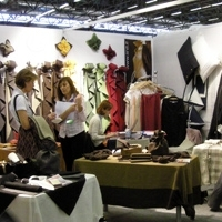 Международная выставка Macef Milano